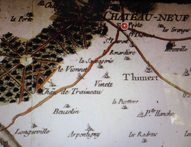 Carte de Cassini centrée sur la seigneurie de Tresneau comprenant le Viennet, Vimetz, Longueville